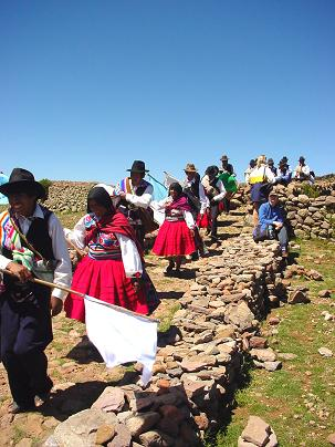 Danzantes del Kashua de San Sebastian en Amantani